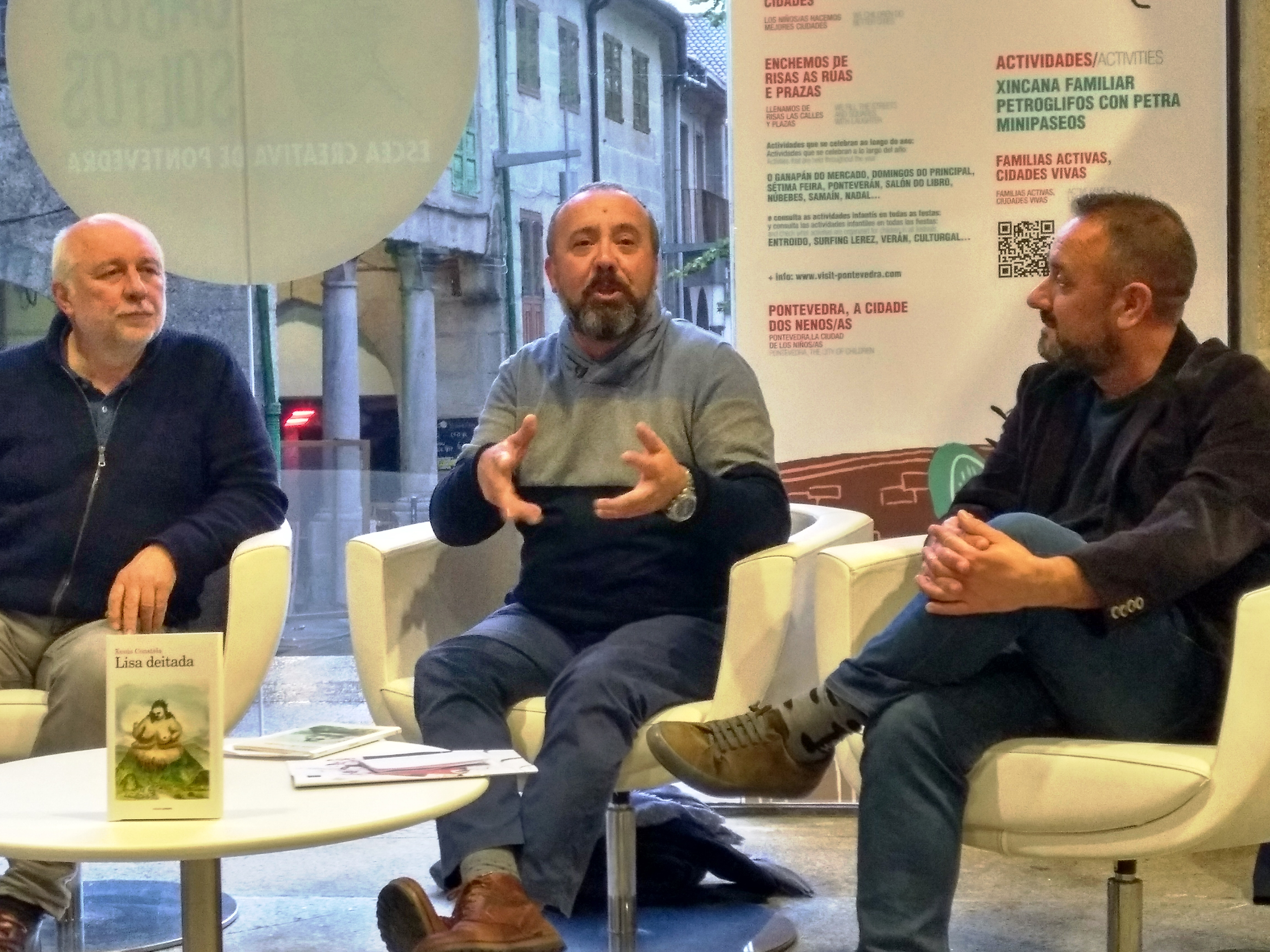 Presentación de "Lisa deitada" de Xesús Constela, con Manuel Lourenzo González e Miguel Toval (editor). Casa da Luz de Pontevedra, 09/04/2019. Acto organizado pola Libraía Paz